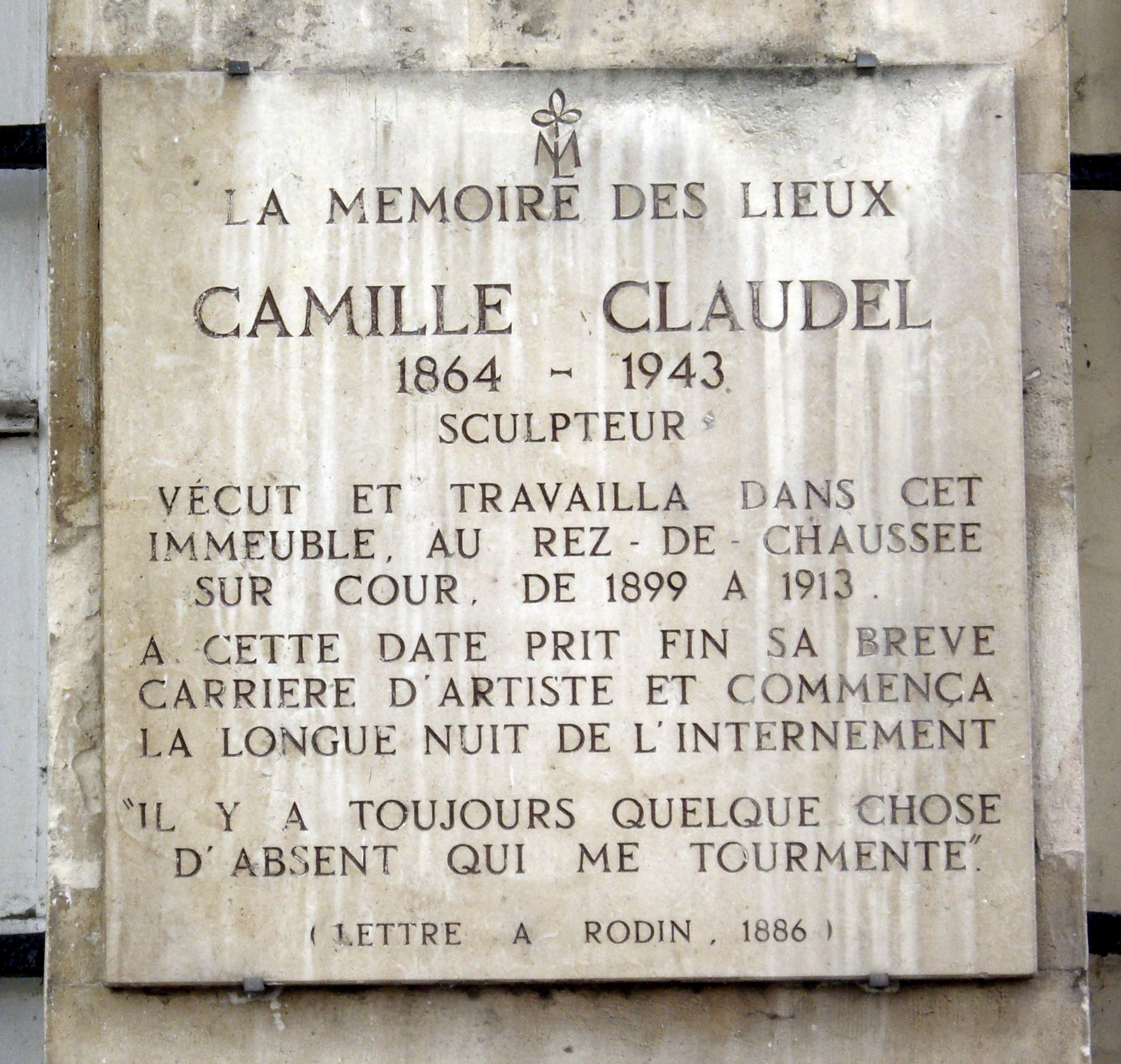 Plaque apposée au n° 19 du quai de Bourbon, Paris 4e :La Mémoire des Lieux.Camille Claudel (1864-1943), sculpteur, vécut et travailla dans cet immeuble, au rez-de-chaussée sur cour, de 1899 à 1913. À cette date prit fin sa brève carrière d'artiste et commença la longue nuit de l'internement.« Il y a toujours quelque chose d'absent qui me tourmente. » (Lettre à Rodin, 1886)